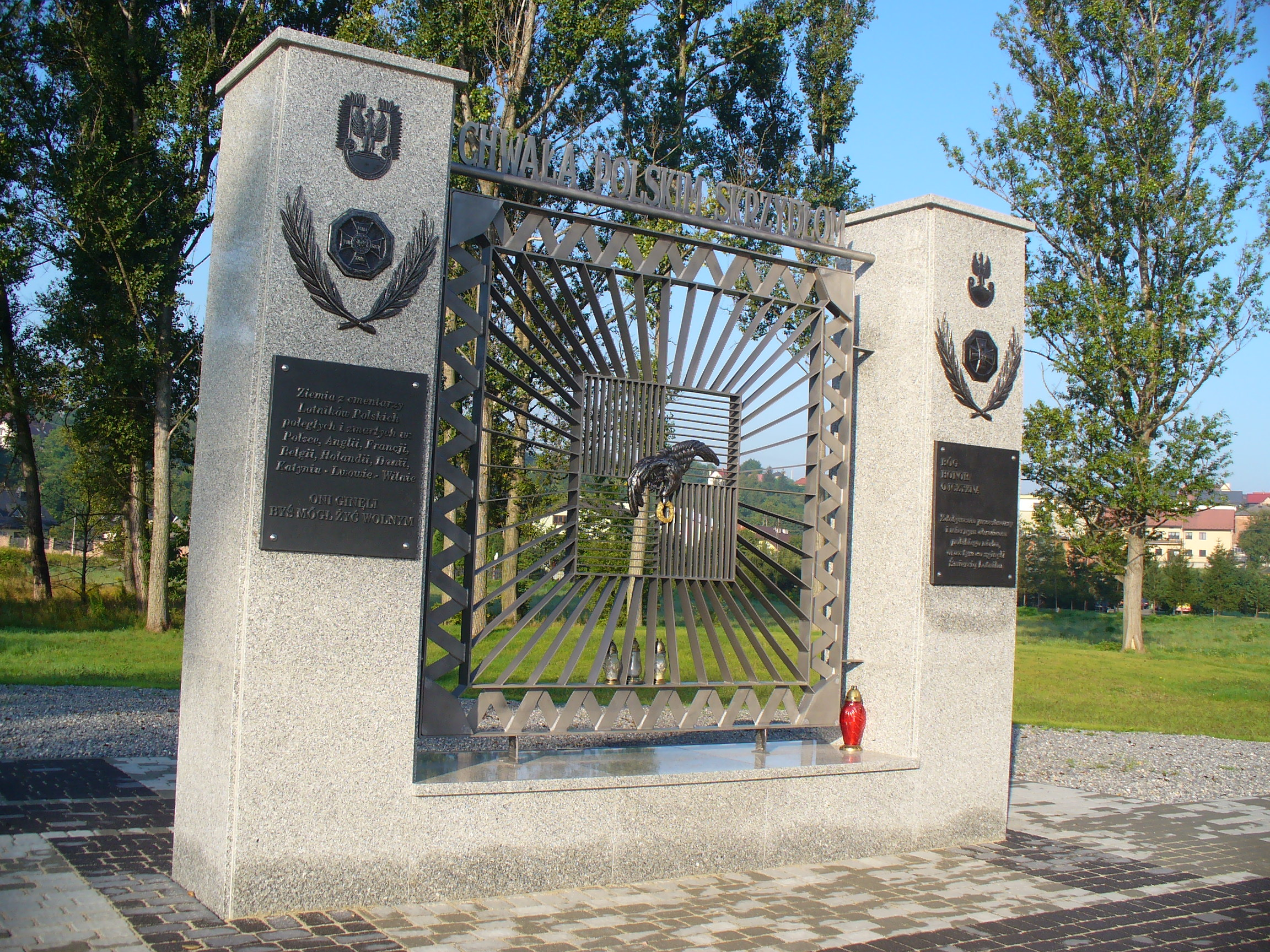 Pomnik lotników polskich na Topólkach